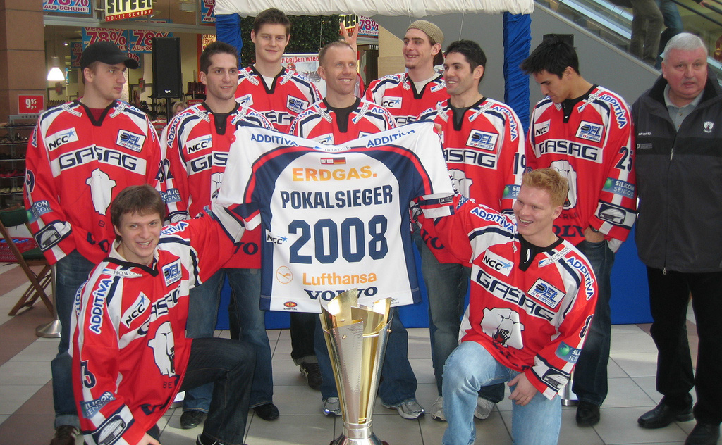 Die Eisbären Berlin bei einem öffentlichen Termin nach dem Pokalsieg 2008